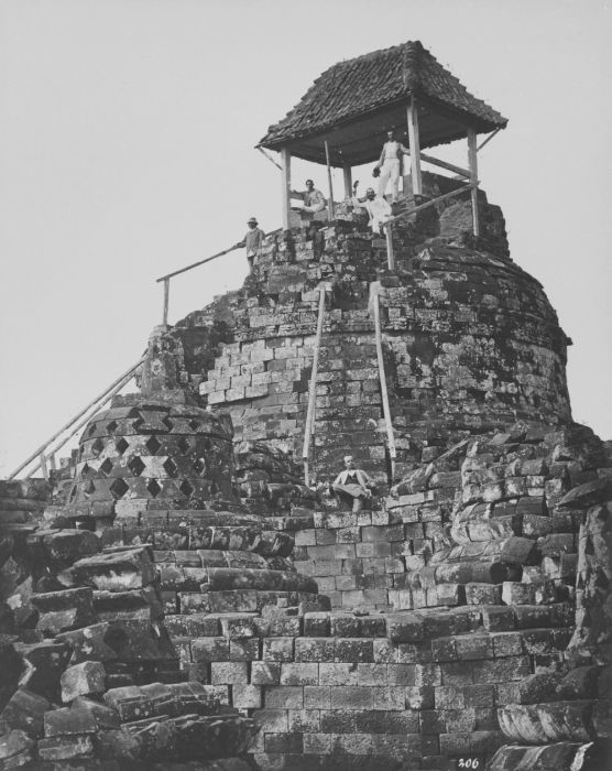 foto. Europese mannen poseren op het tempelcomplex van de Borobudur bij de bovenste stupa waarop een afdak en trapleuningen zijn geplaatst